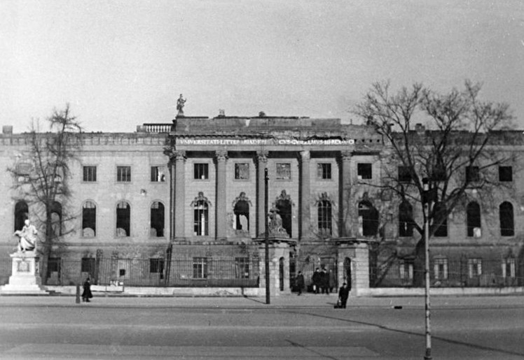 Berlin, Humboldt-Universität, Hauptgebäude, Ruine Berlin 1950 Die Humboldt-Universität (vom August-Bebel-Platz aus gesehen) Aufn.: Illus Funck 2 5202-50 27.1.50